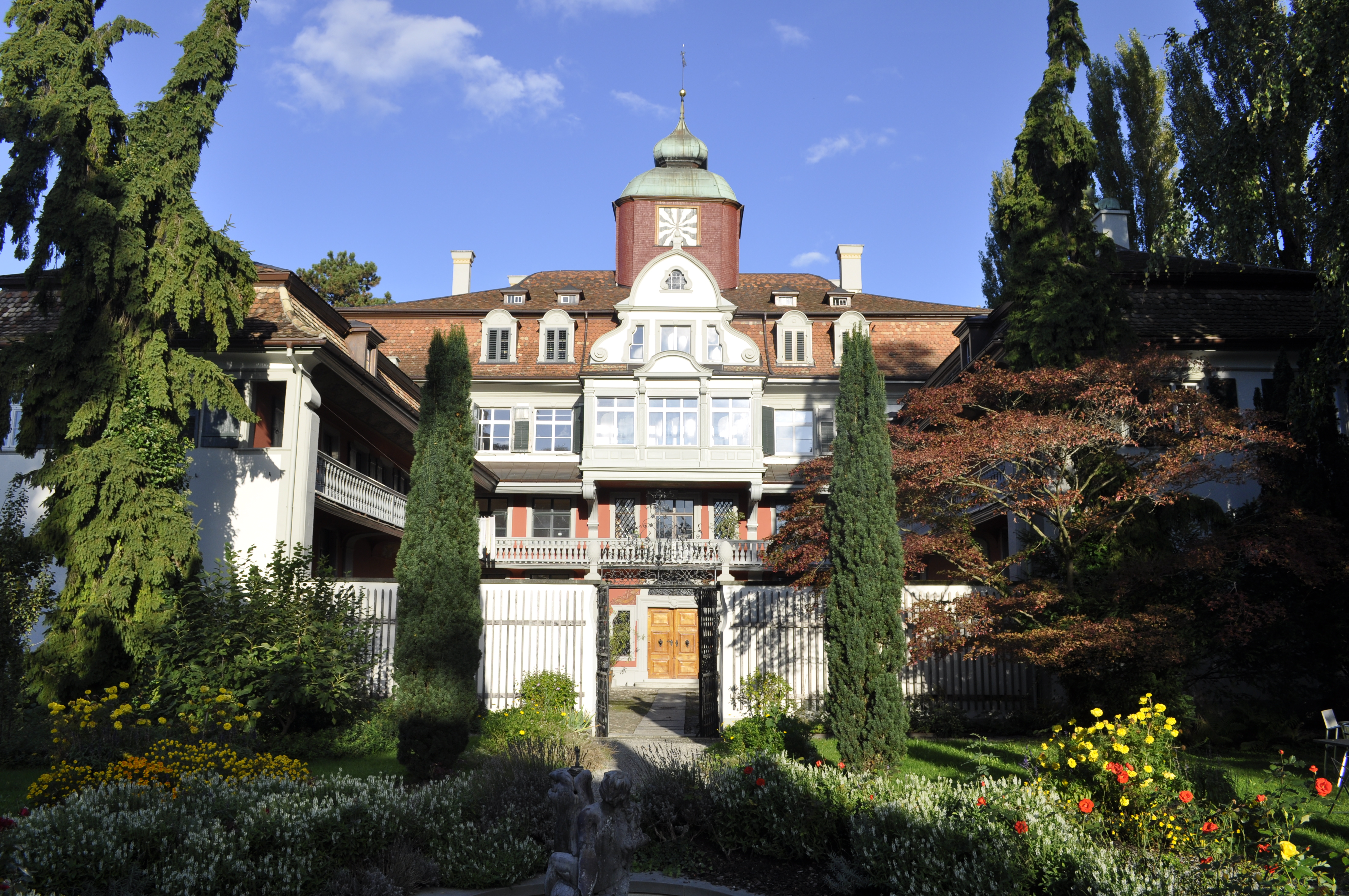 Löwenhof à Rheineck (47.4679 N 9.58667 E). vue du jardin